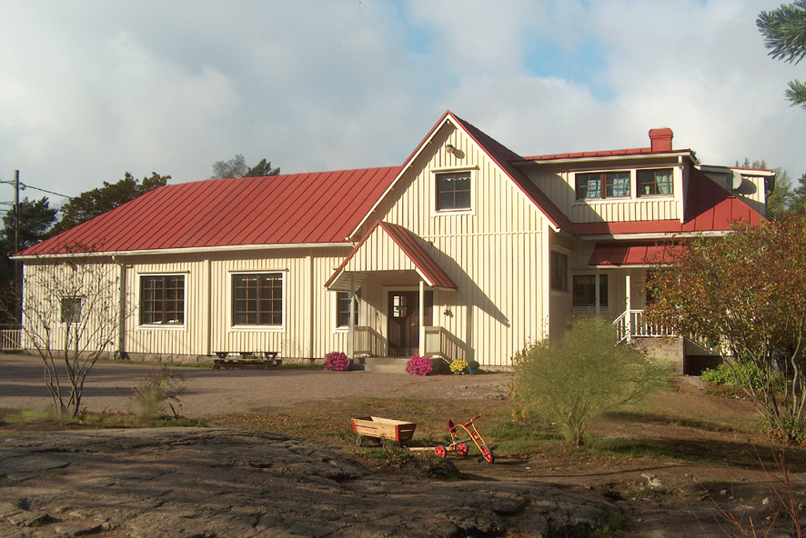 Bergåsa syksyllä 2016